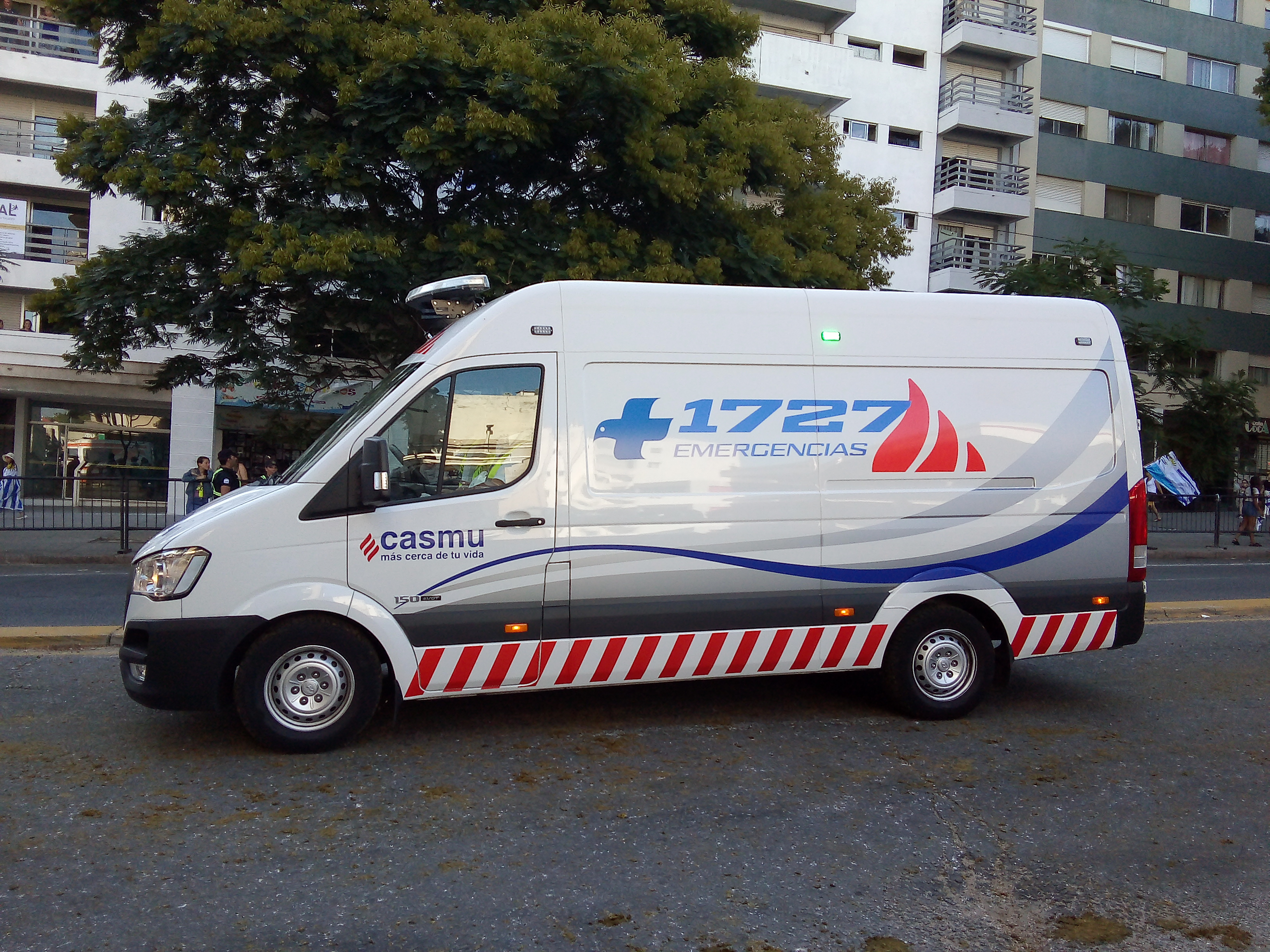 Ambulancia de 1727 en el desfile presidencial de Luis Alberto Lacalle Pou; Avda del Libertador y Lima, Montevideo, Uruguay